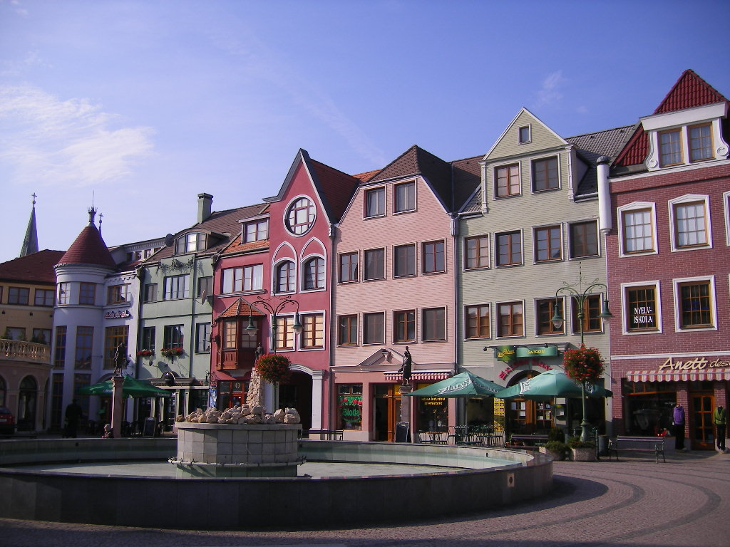 Komárom - Európa-udvar